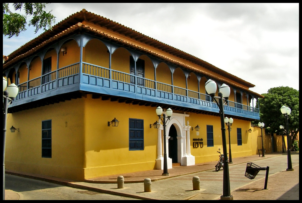 MUY BUENO